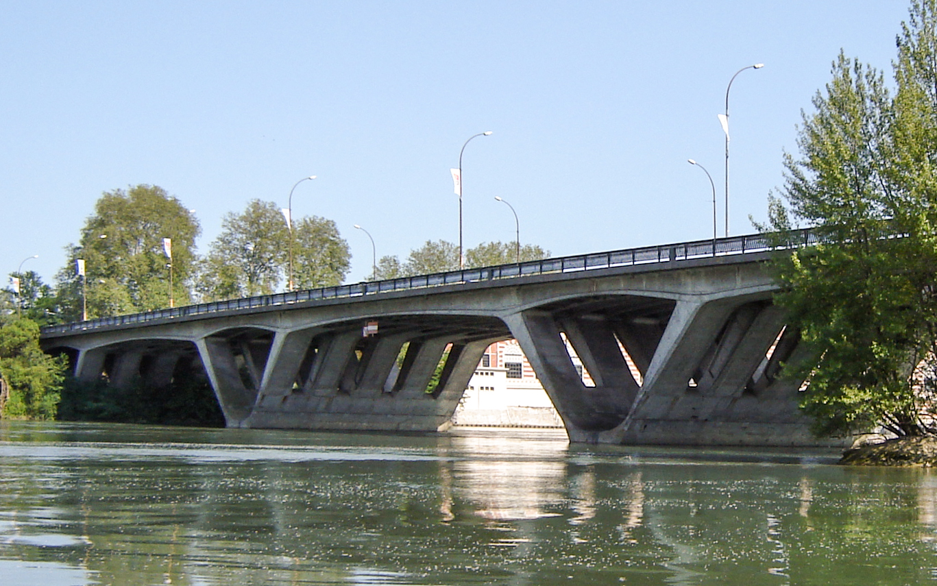 Toulouse (Haute-Garonne, France) : Le pont Saint-Michel, vu depuis la Prairie des Filtres.